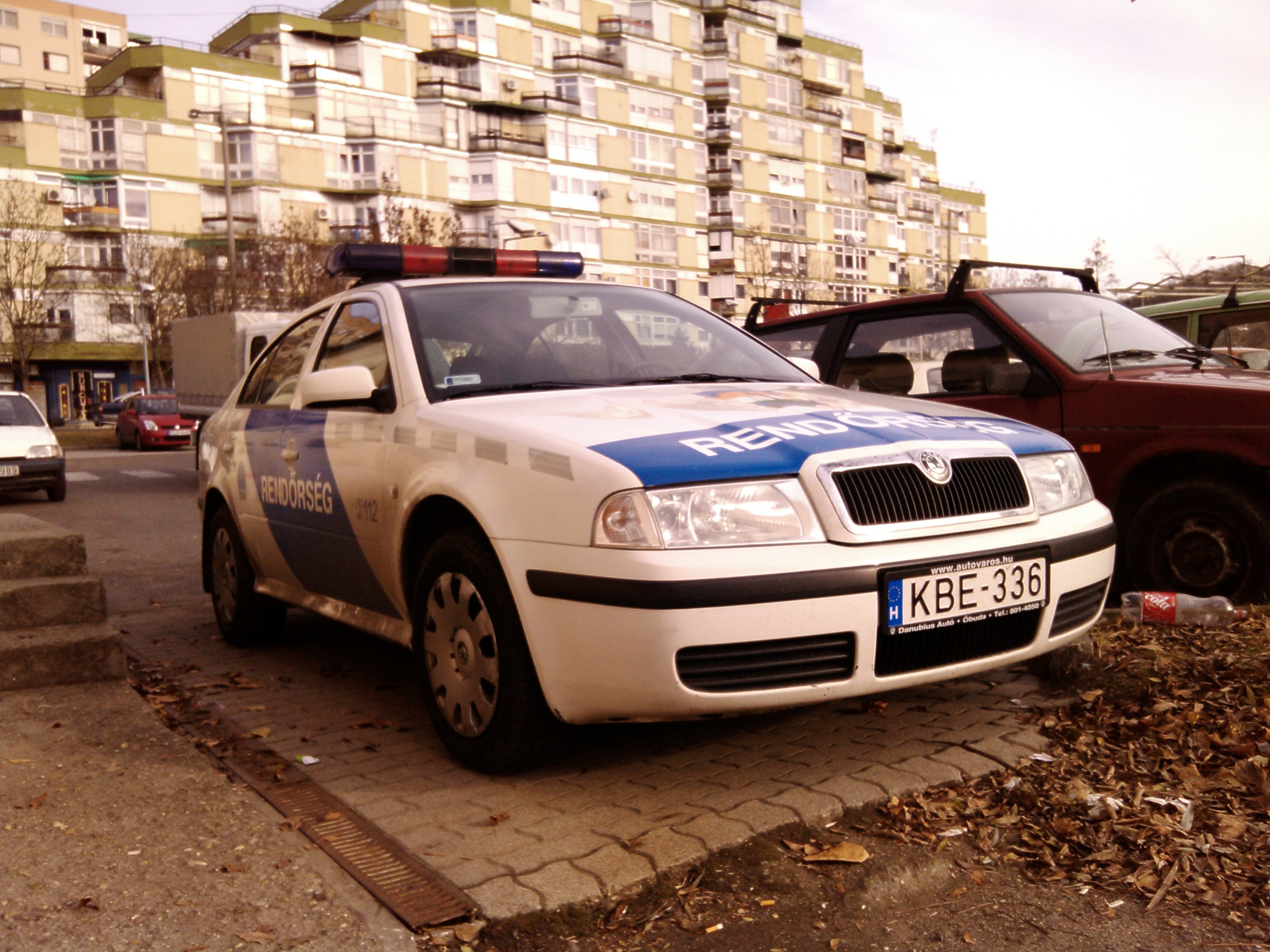 Skoda Octavia járőrkocsi Komló városában